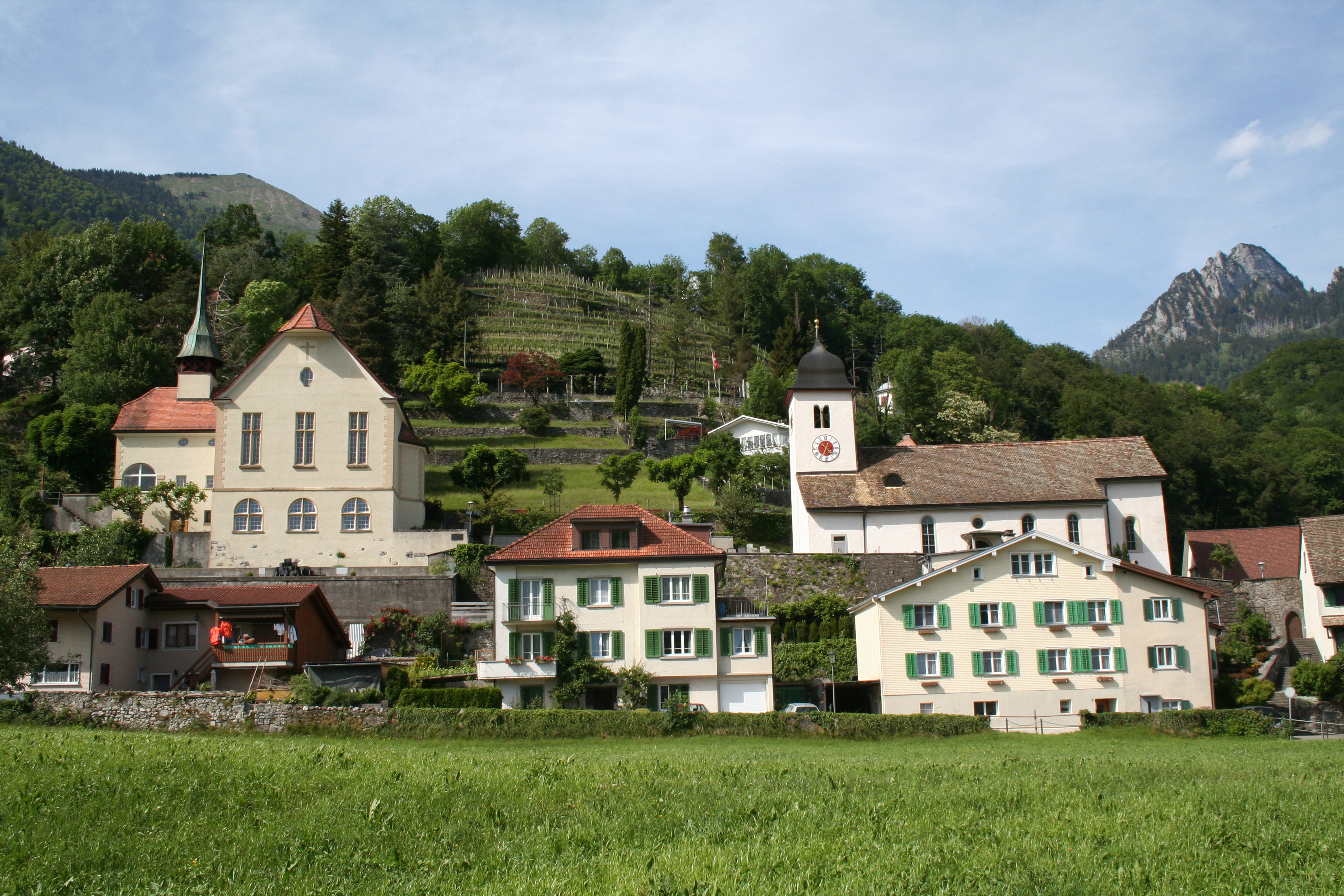 in Weesen